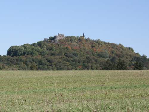 Zřícenina hradu Švamberk (nazýván též Krasíkov) na vrchu Krasíkov v okrese Tachov, Plzeňský kraj, Česká republika.